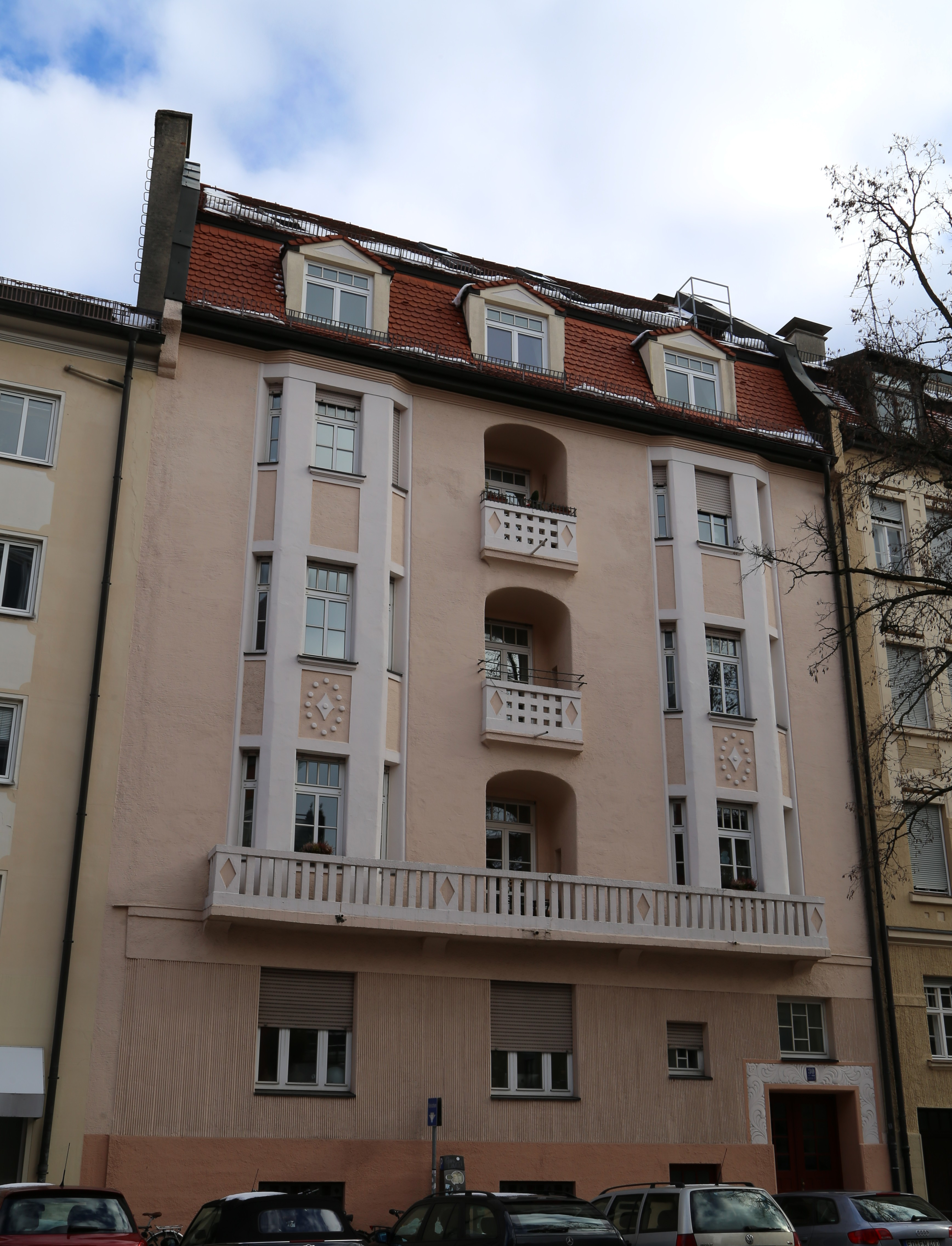 Kurfürstenstraße 30; Mietshaus. Viergeschossiger Mansarddachbau mit Polygonalerkern und Balkonen, in Formen des späten Jugendstils, 1911 von Heinrich Stengel und Paul Hofer.